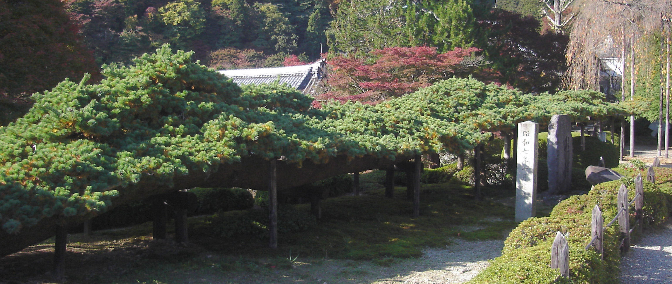 Yoshiminedera Yuryuno-matsu, Kyoto, japan